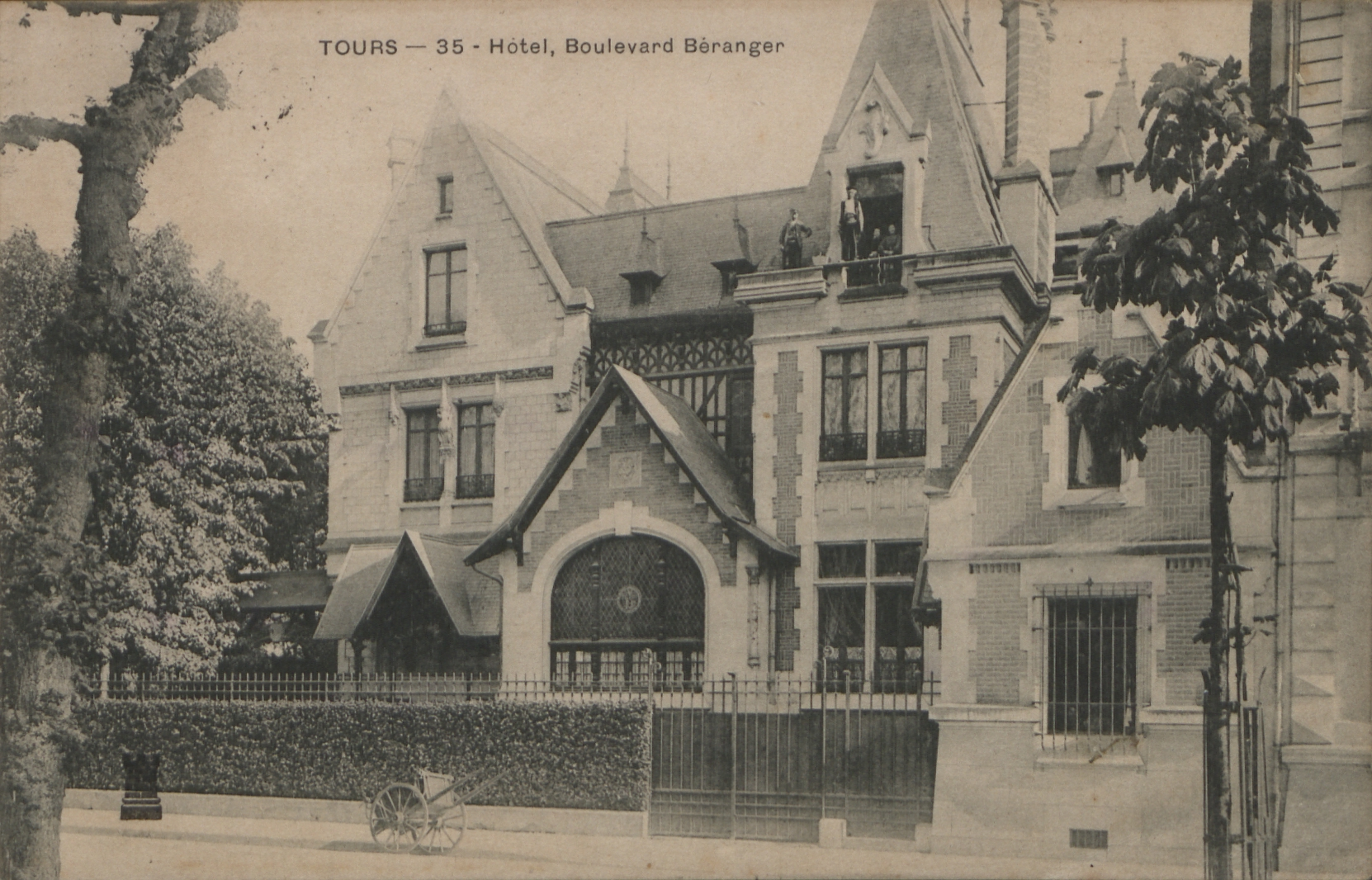 Hôtel, Boulevard Boulanger